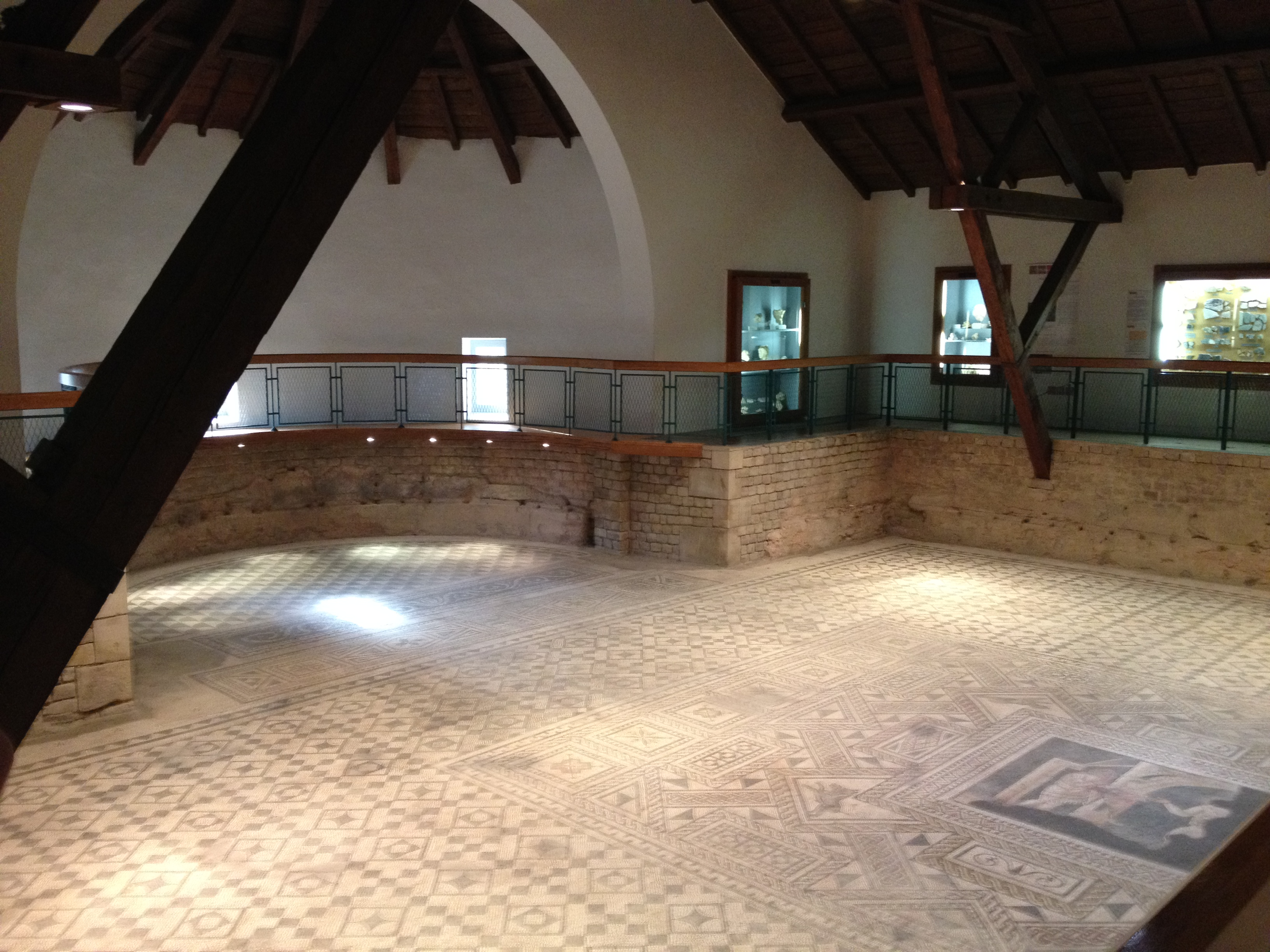 La mosaïque situé à proximité de l’amphithéâtre est l'une des plus grande d'Europe avec une surface de 232m2.